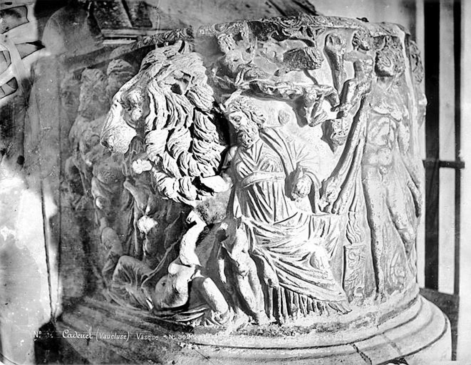 Cadenet baptistère